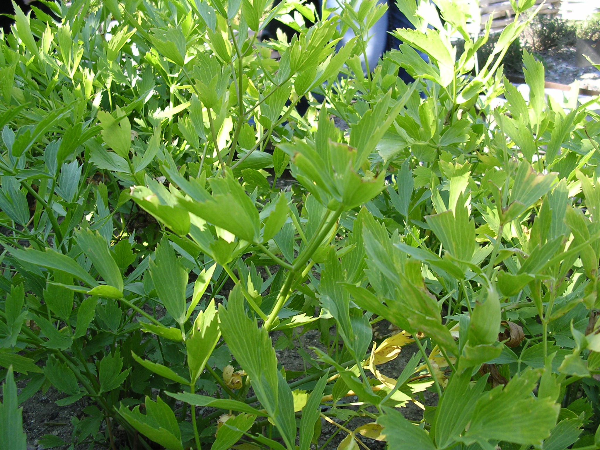 liveche asche des montagnes